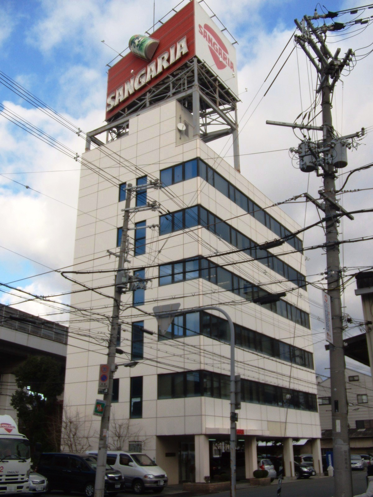 株式会社日本サンガリアベバレッジカンパニー本社を撮影